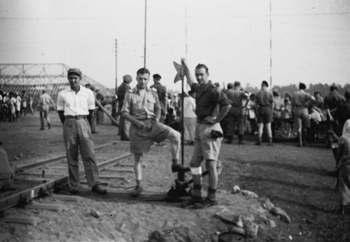 negatief. Militairen van de Zeven December Divisie in Kamp Doeri